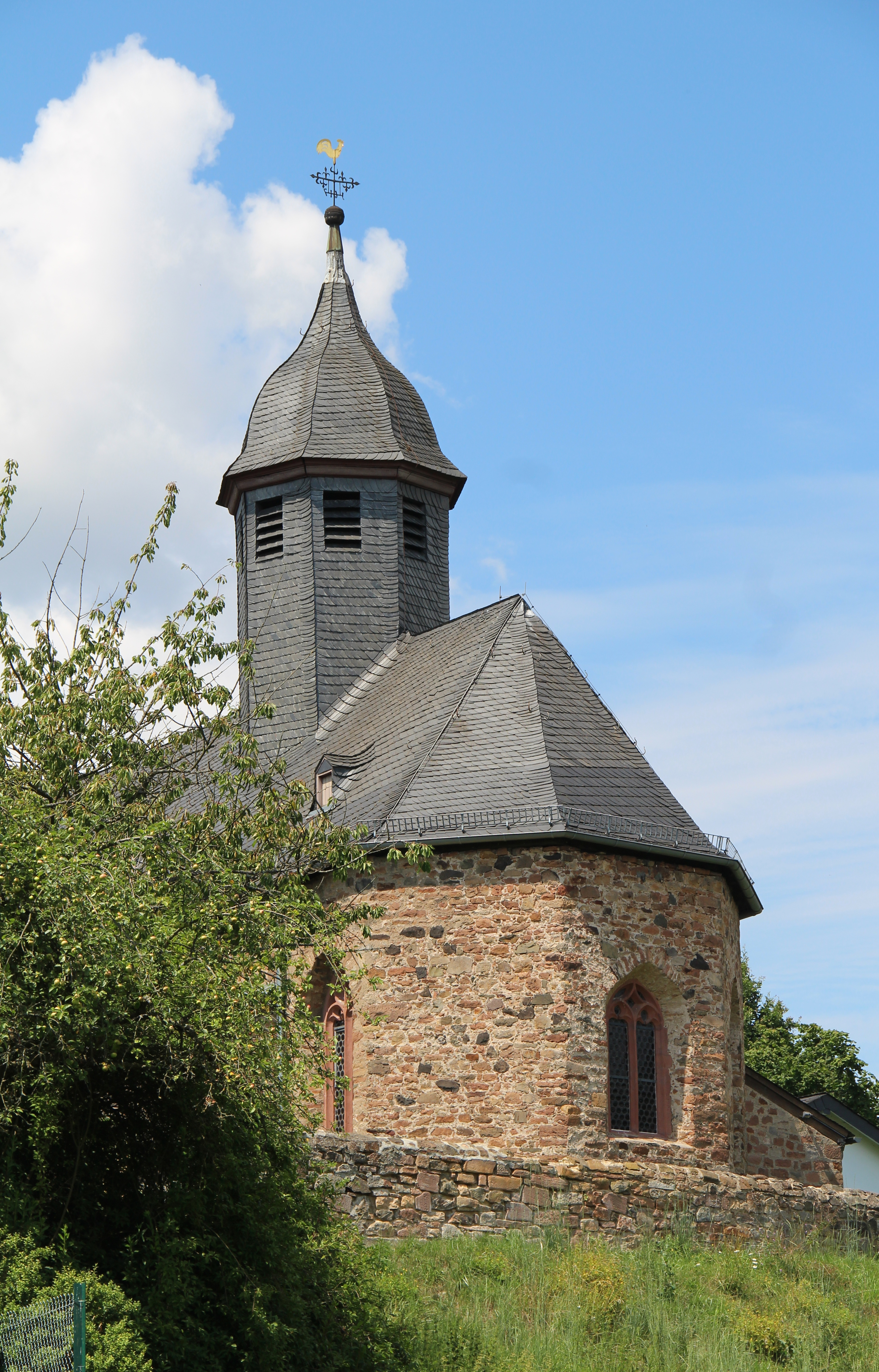 Kirche - Sicht vom Lahntalradweg